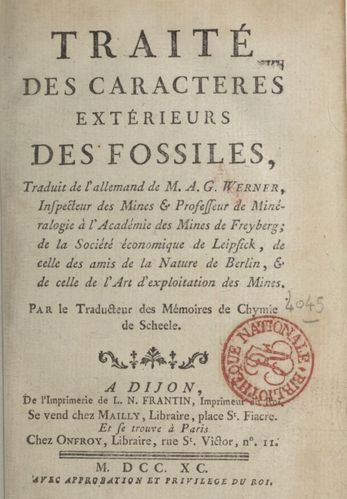 Page de couverture Titre : Traité des caractères extérieurs des fossiles , traduit de l'allemand de M. A. G. Werner,... Par le traducteur des "Mémoires de chymie" de Scheele Auteur : Werner, Abraham Gottlob (1750-1817). Auteur du texte Éditeur : impr. de L.-N. Frantin (Dijon) Date d'édition : 1790 Contributeur : Guyton de Morveau, Claudine Poullet, Mme Picardet, puis Mme. Traducteur Type : monographie imprimée Langue : Français Langue : français Format : XXX-[2]-350 p., tableaux ; in-12 Format : Nombre total de vues : 413 Description : Contient une table des matières Description : Avec mode texte Droits : domaine public Identifiant : ark:/12148/bpt6k9645858w Source : Bibliothèque nationale de France, département Sciences et techniques, S-20551 Relation : Provenance : Bibliothèque nationale de France